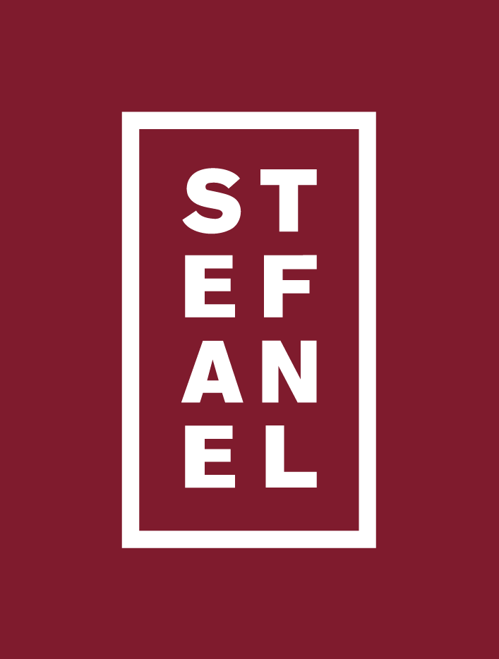 STEFANEL corporate logo (old)